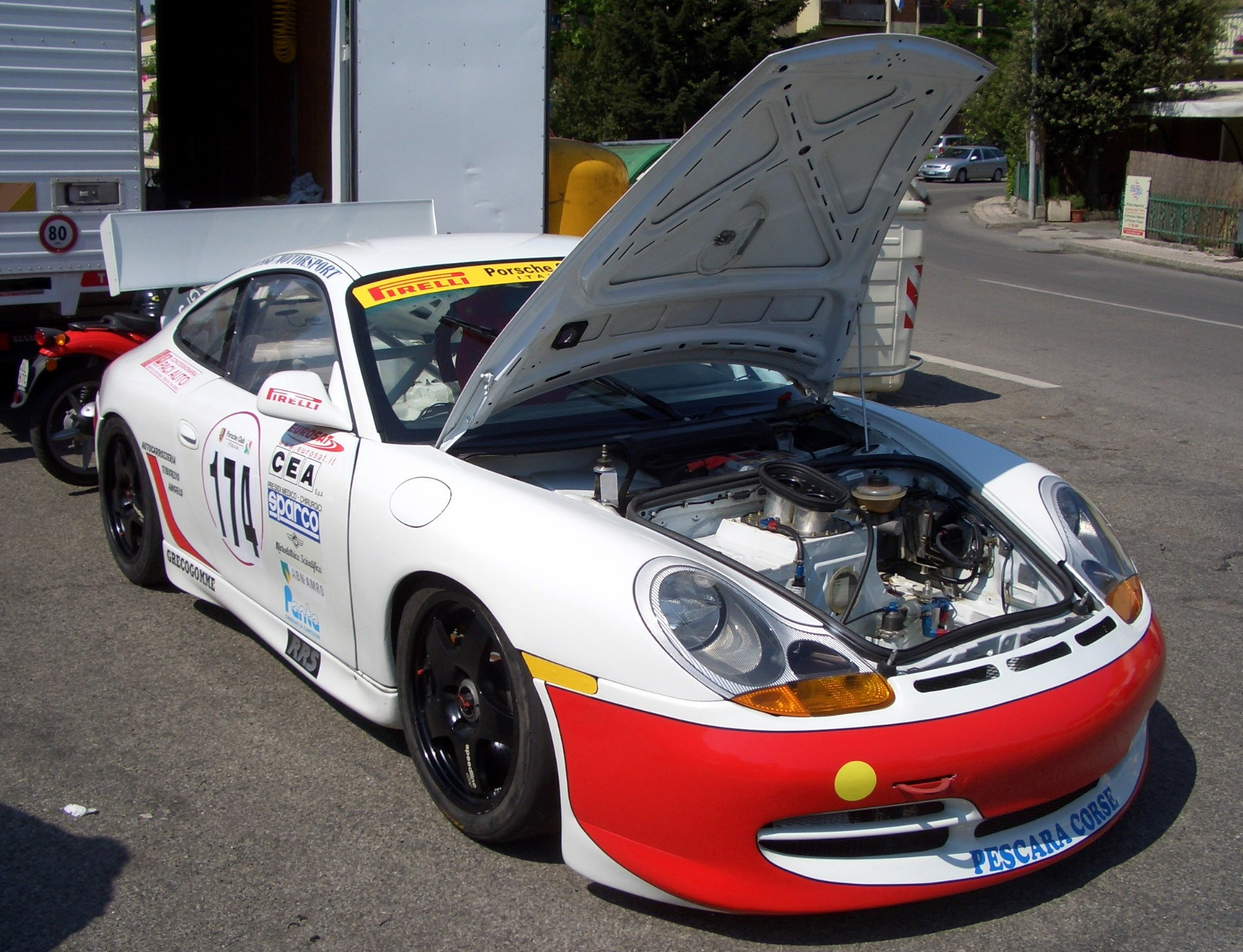 Porsche 911/996 GT3 preparata per le competizioni, foto scattata da me il 6 maggio 2006. La vettura partecipava a una corsa su strada. Da notare il serbatoio anteriore con i bocchettoni aeronautici per il rifornimento in corsa.